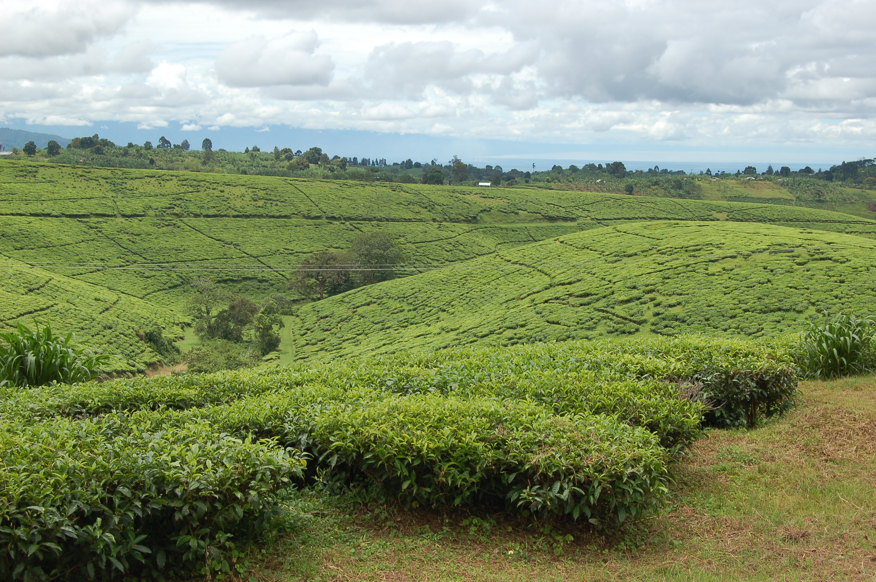 Tea fields, Tukuyu, Tanzania